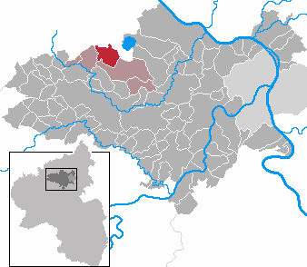 Gemeinde Bell im Landkreis Mayen-Koblenz